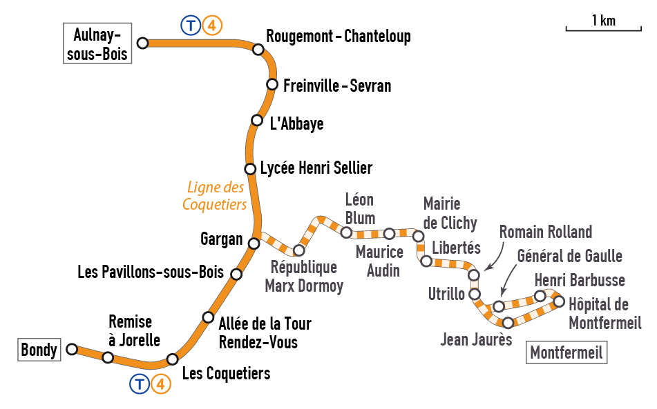 Plan der Linie T4 der Straßenbahn Paris